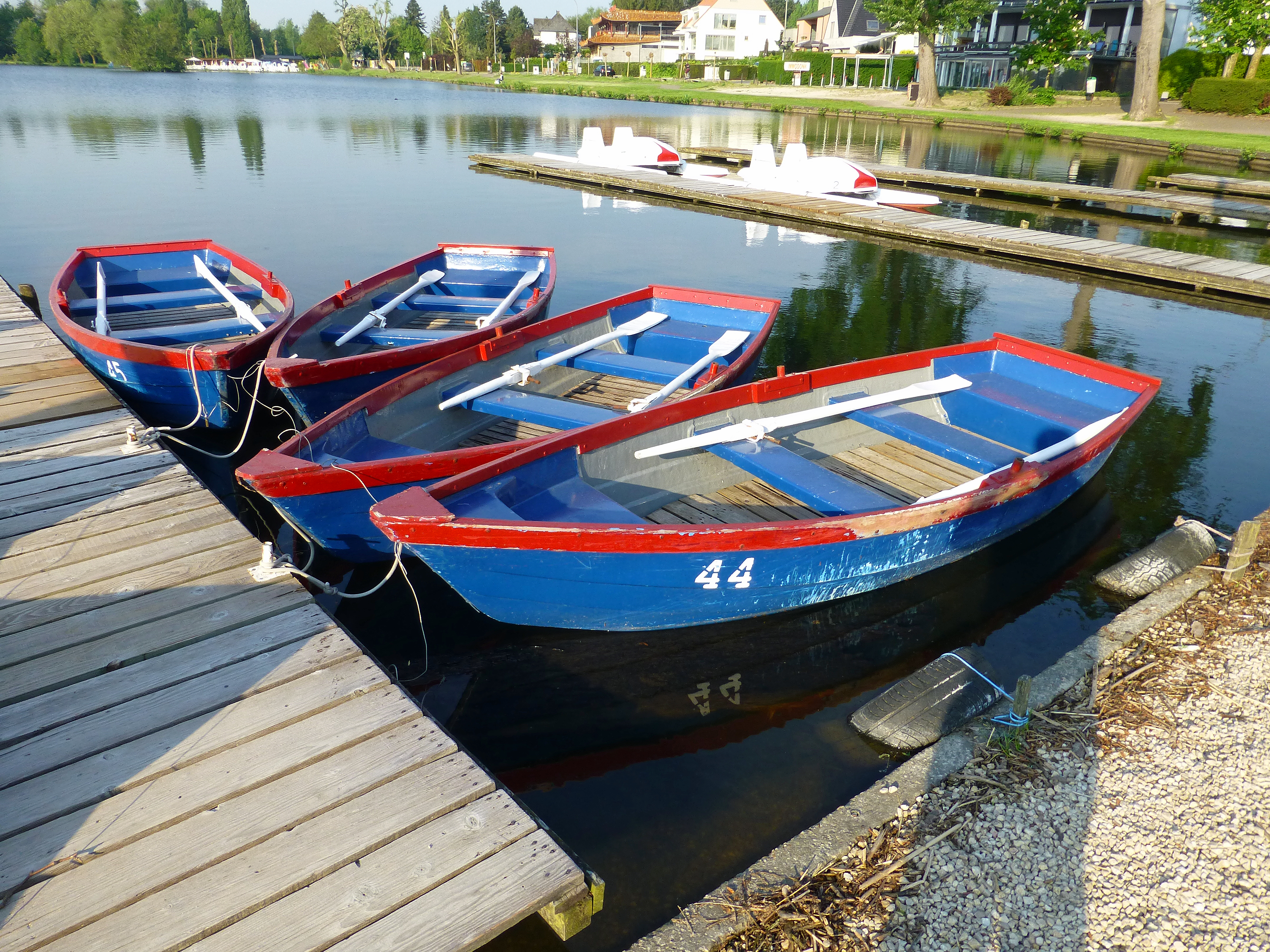 Roeiboot op het Donkmeer in Berlare, België.